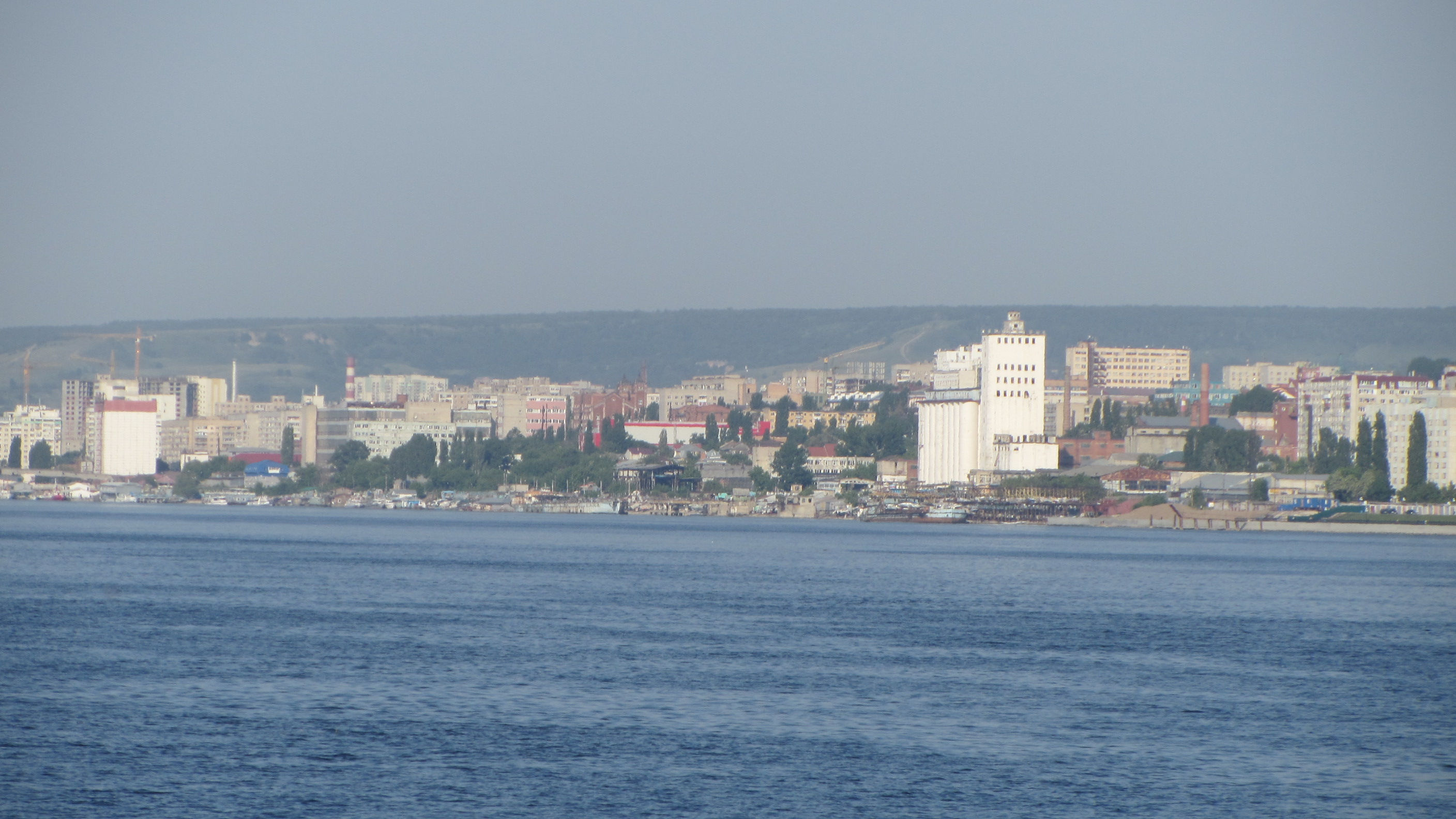 Oktyabrskiy rayon, Saratov, Saratovskaya oblast', Russia